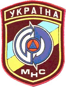 Нашивка военнослужащих МЧС до 2003 г.